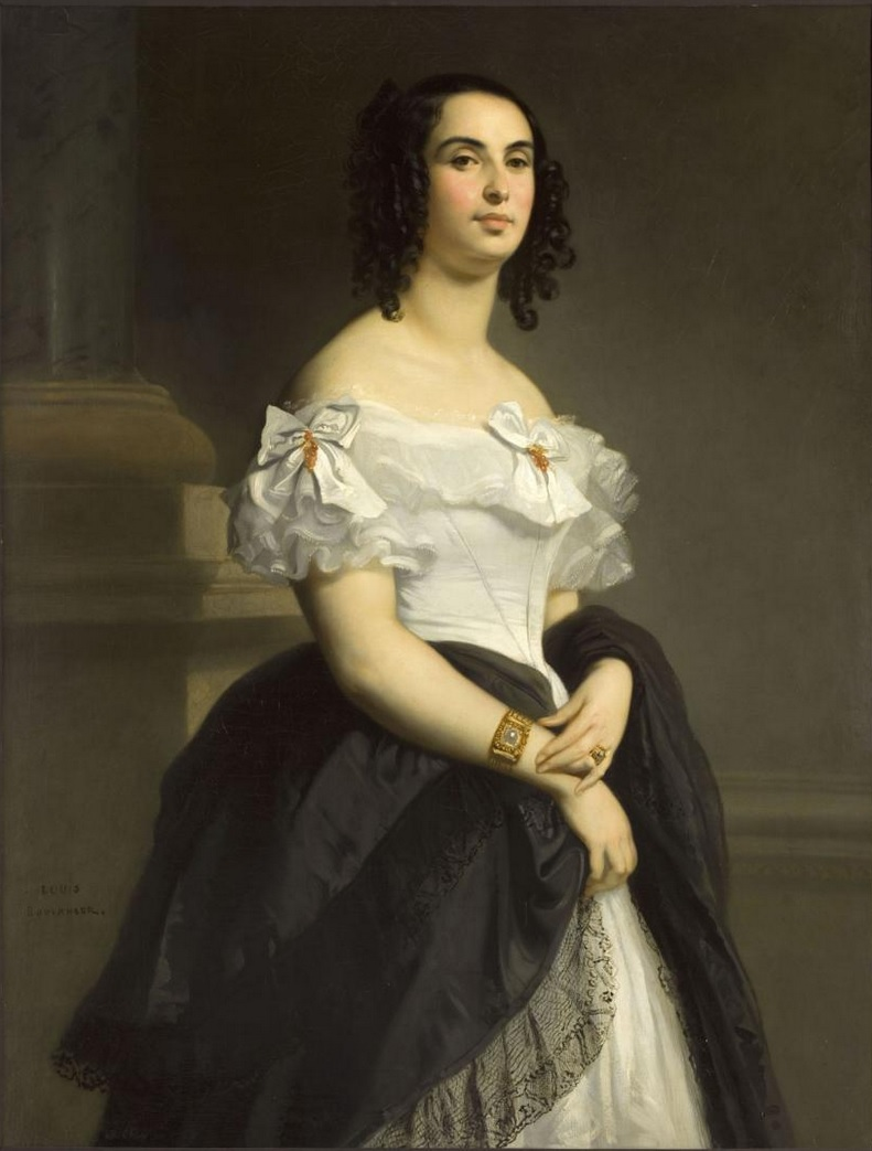 Portrait of Adele Hugo (1803-1868)label QS:Len,"Portrait of Adele Hugo (1803-1868)" label QS:Lel,"Η σύζυγος του Βίκτωρα Ουγκό, Αντέλ" label QS:Lfr,"Adèle Hugo, née Adèle Foucher (1803-1868), portrait en pied."